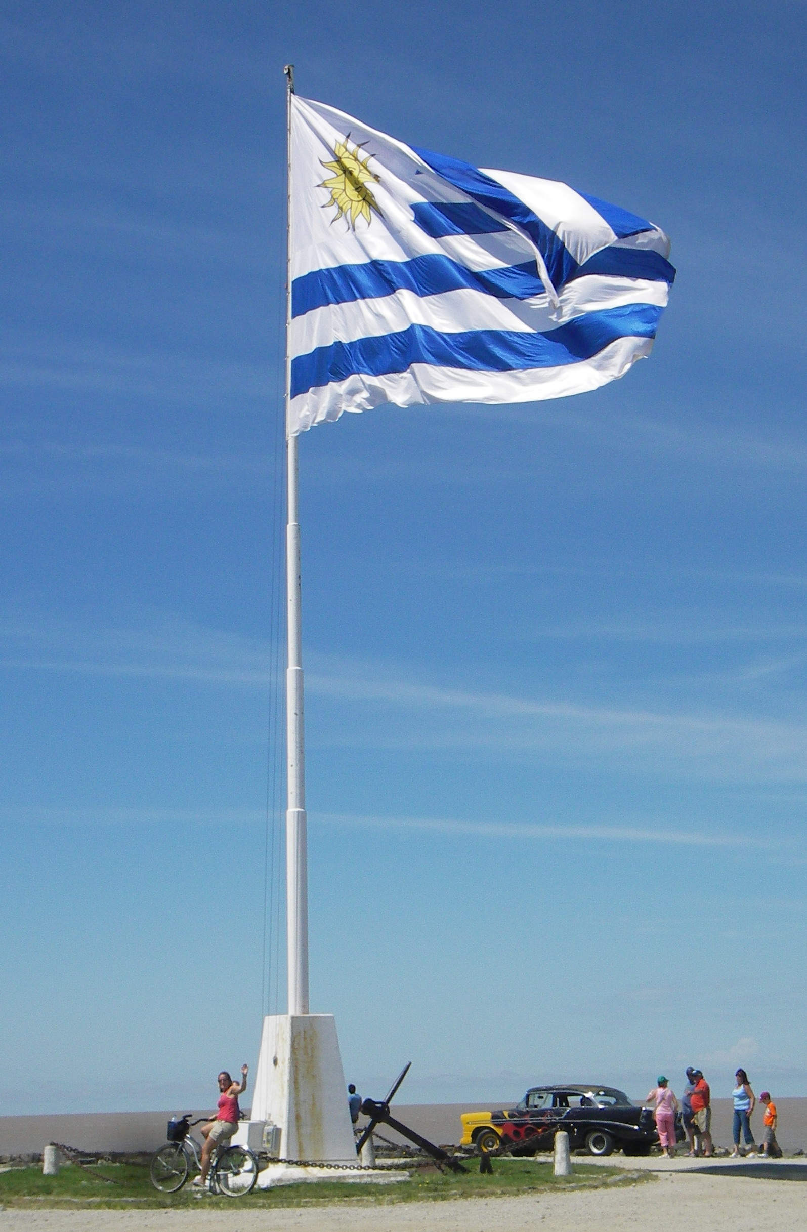 Imagen de bandera uruguaya.